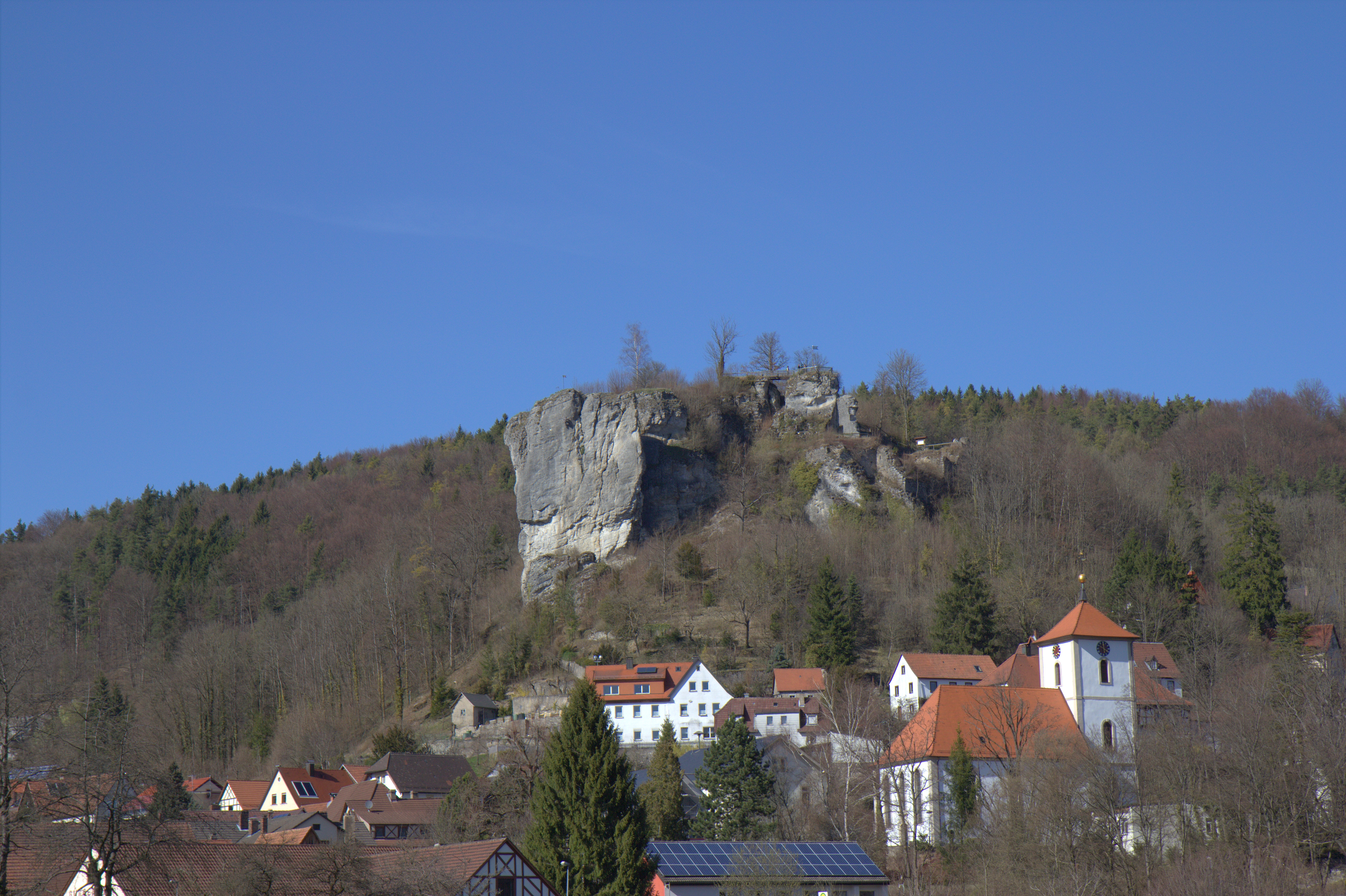 Burgruine Streitberg - Ansicht des Burgfelsens aus südlicher Richtung